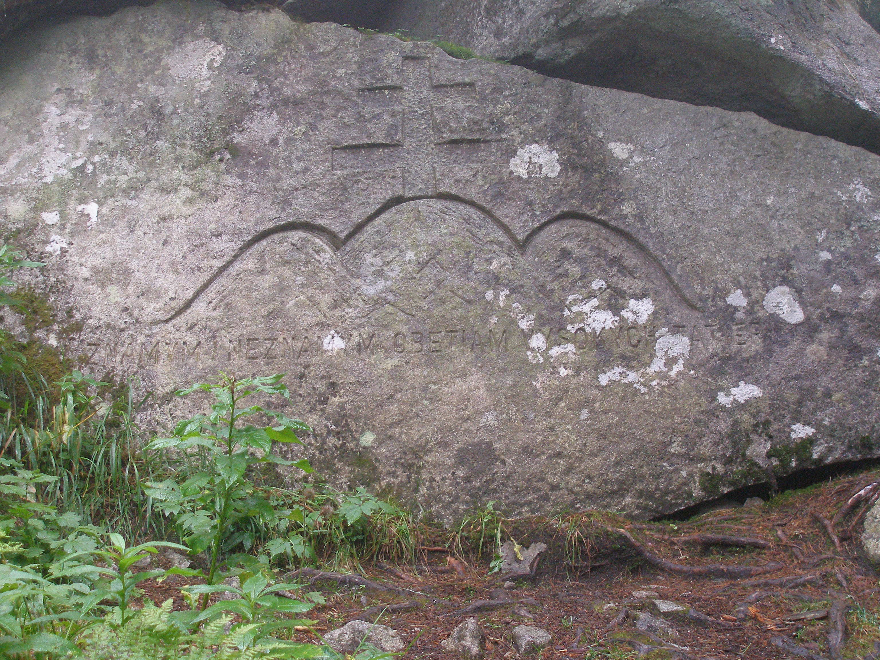 Areál cintorína. Kameň s nápisom ZNÁMYM I NEZNÁMYM OBETIAM VYSOKÝCH TATIER .